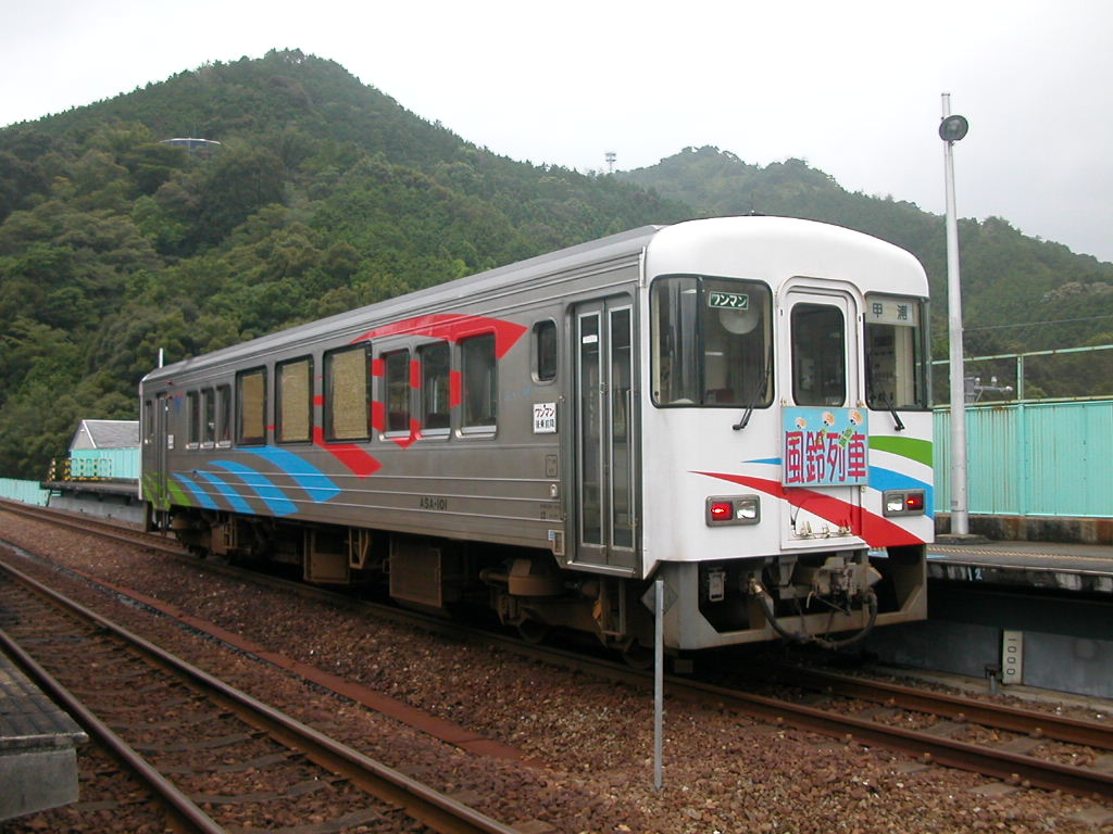 Asa Kaigan Railway ASA-101 Series train.